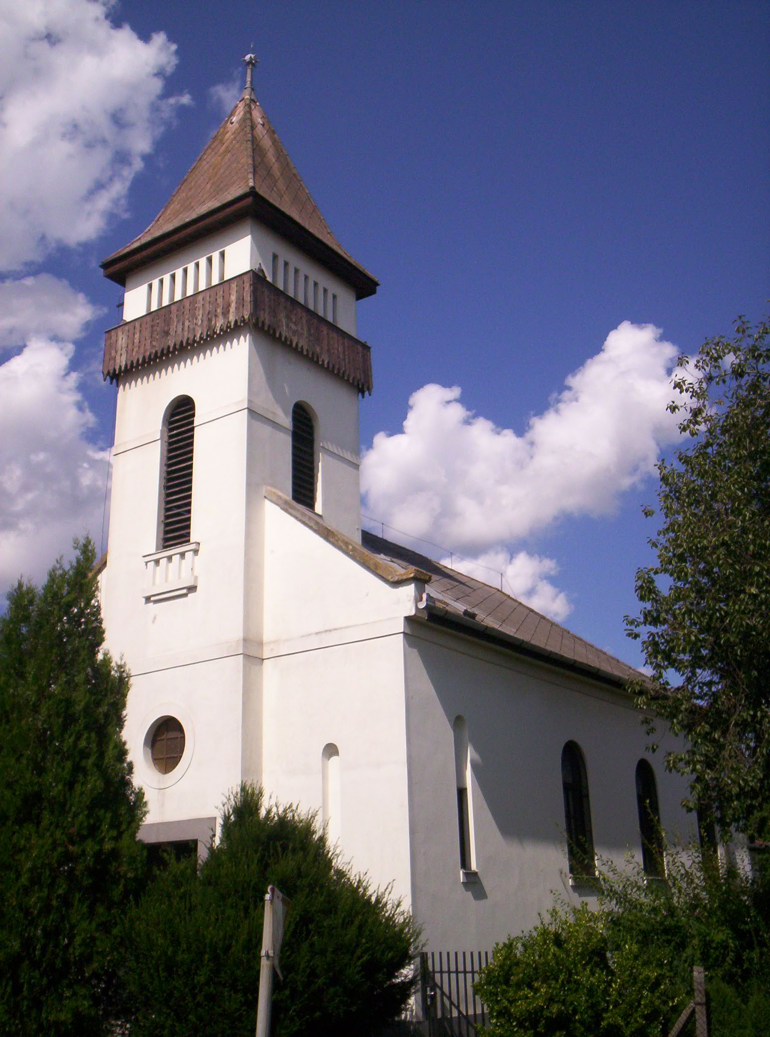 A szentlőrinci református templom – photo taken by uploader User:Csanády in 2006.